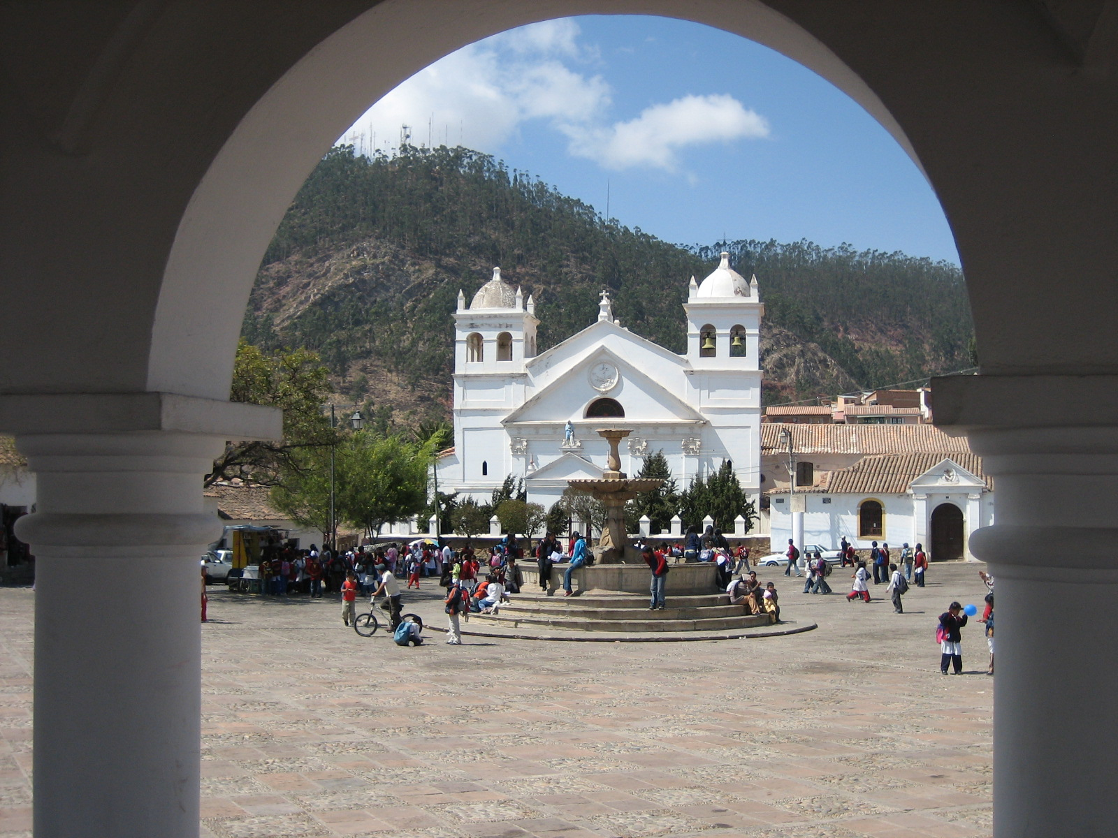 La recoleta, convento en Sucre, Bolivia